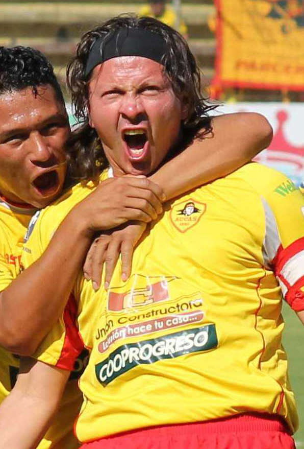 Gustavo Figueroa jugando para Aucas en el 2012